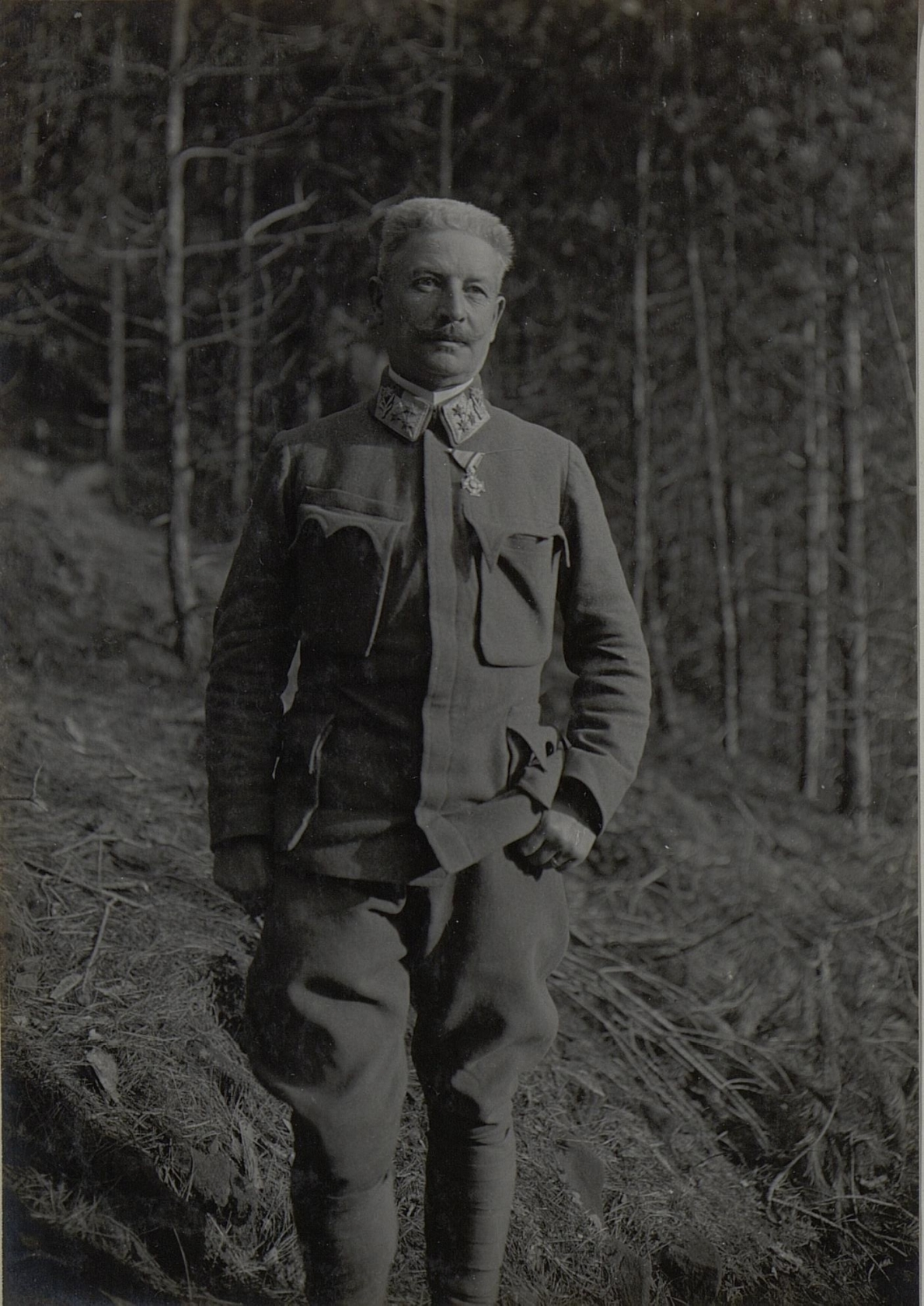 Oberst Schuschigg vom.K.K. Ldw.Inf.Rgt.Nro.4.